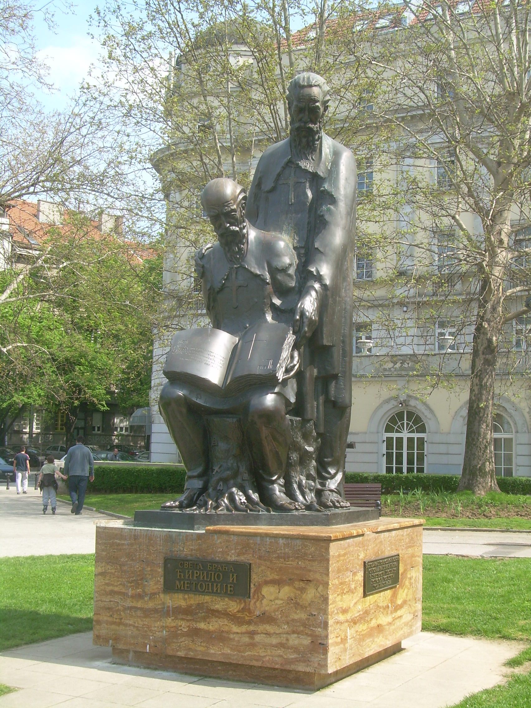 Споменик Ћирилу и Методију у Београду. Парк испред студентског дома Краљ Александар, улица Краља Александра.